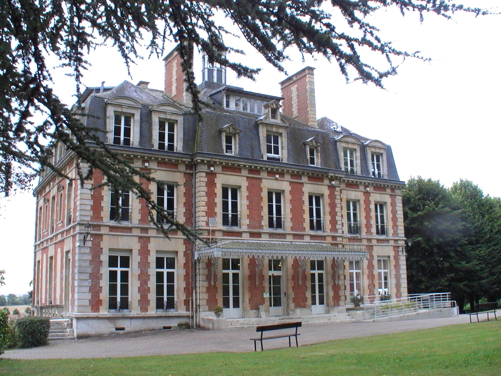 Second château de Tournebut - Aubevoye - Eure - façade côté colline